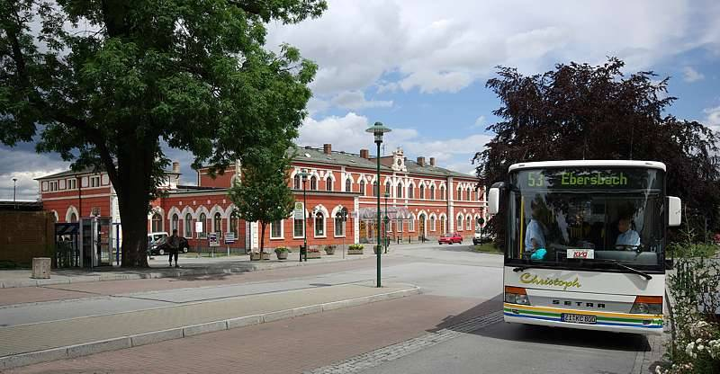 Der Bahnhof Löbau/Sa.